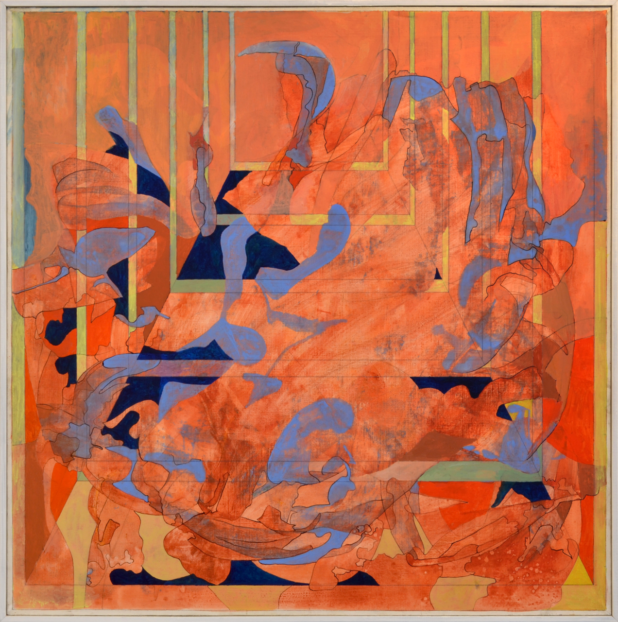 Jiří Mrázek, Perspektiva, olej, plátno, 90x90 cm, kolem r. 1985